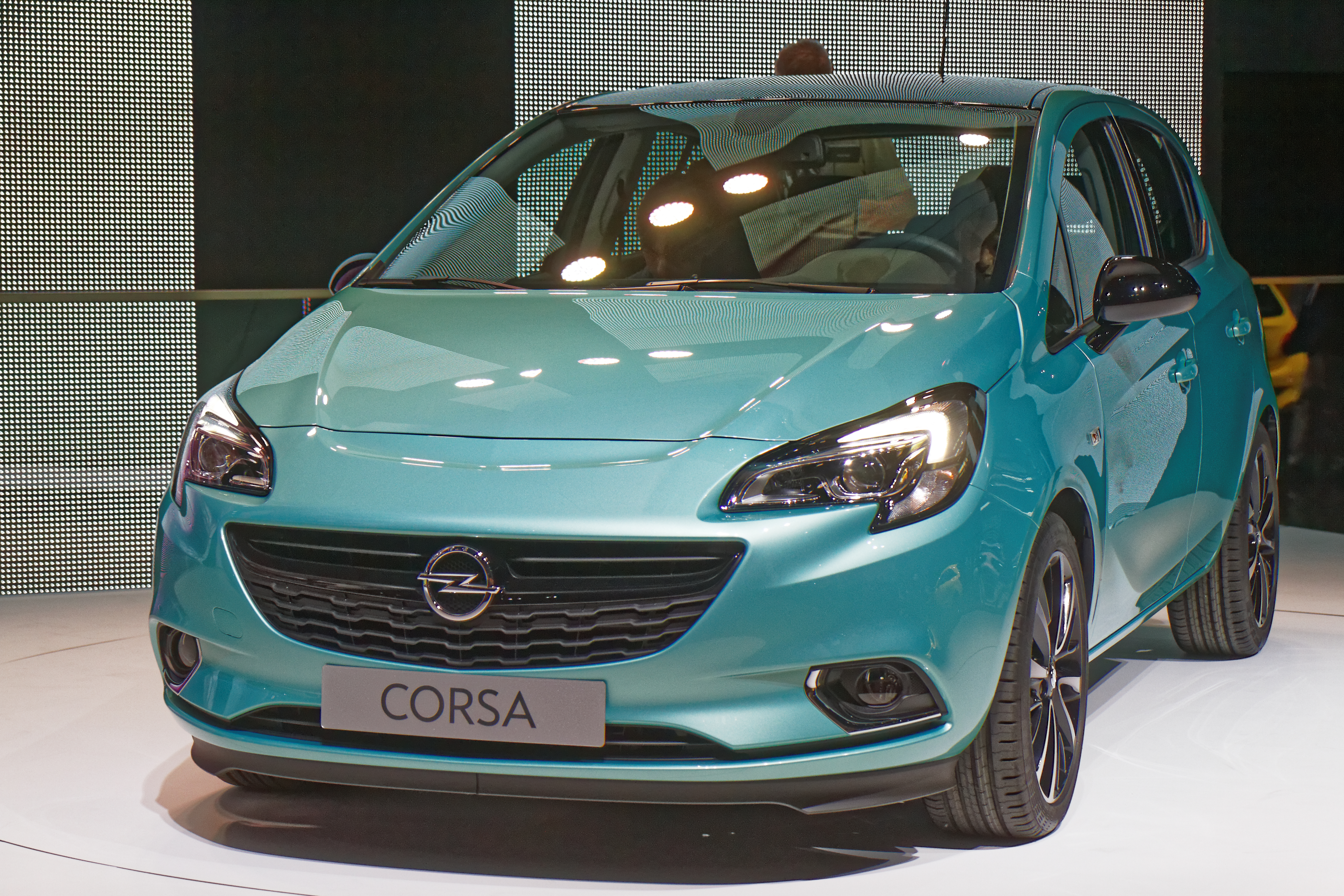 Une Opel Corsa présentée lors du mondial de l'automobile de Paris 2014.